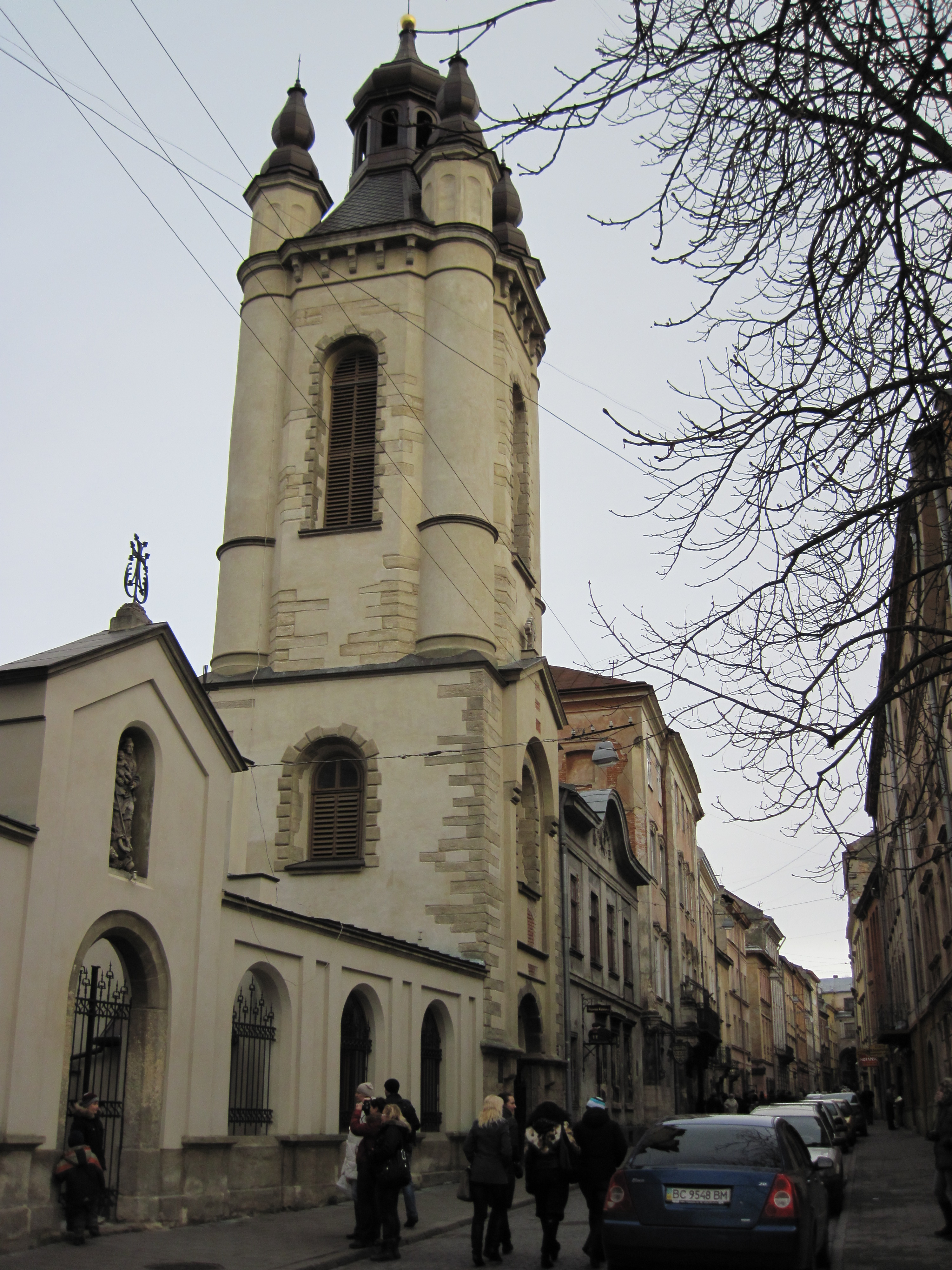 Вірме́нський кафедра́льний собо́р Успі́ння Пресвято́ї Богоро́диці